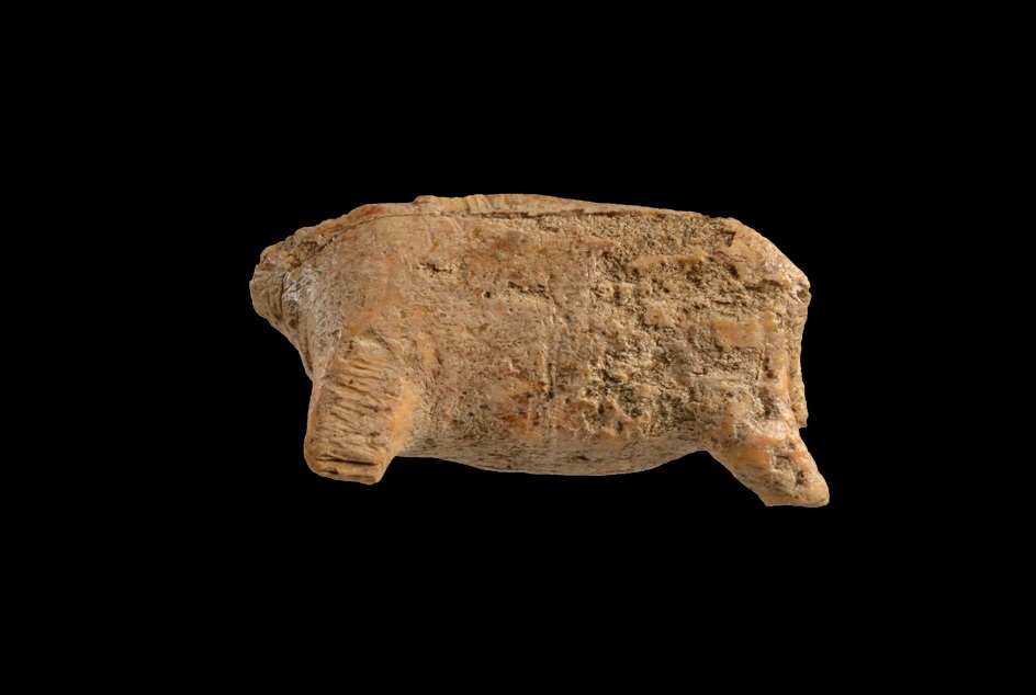 Rinddddd